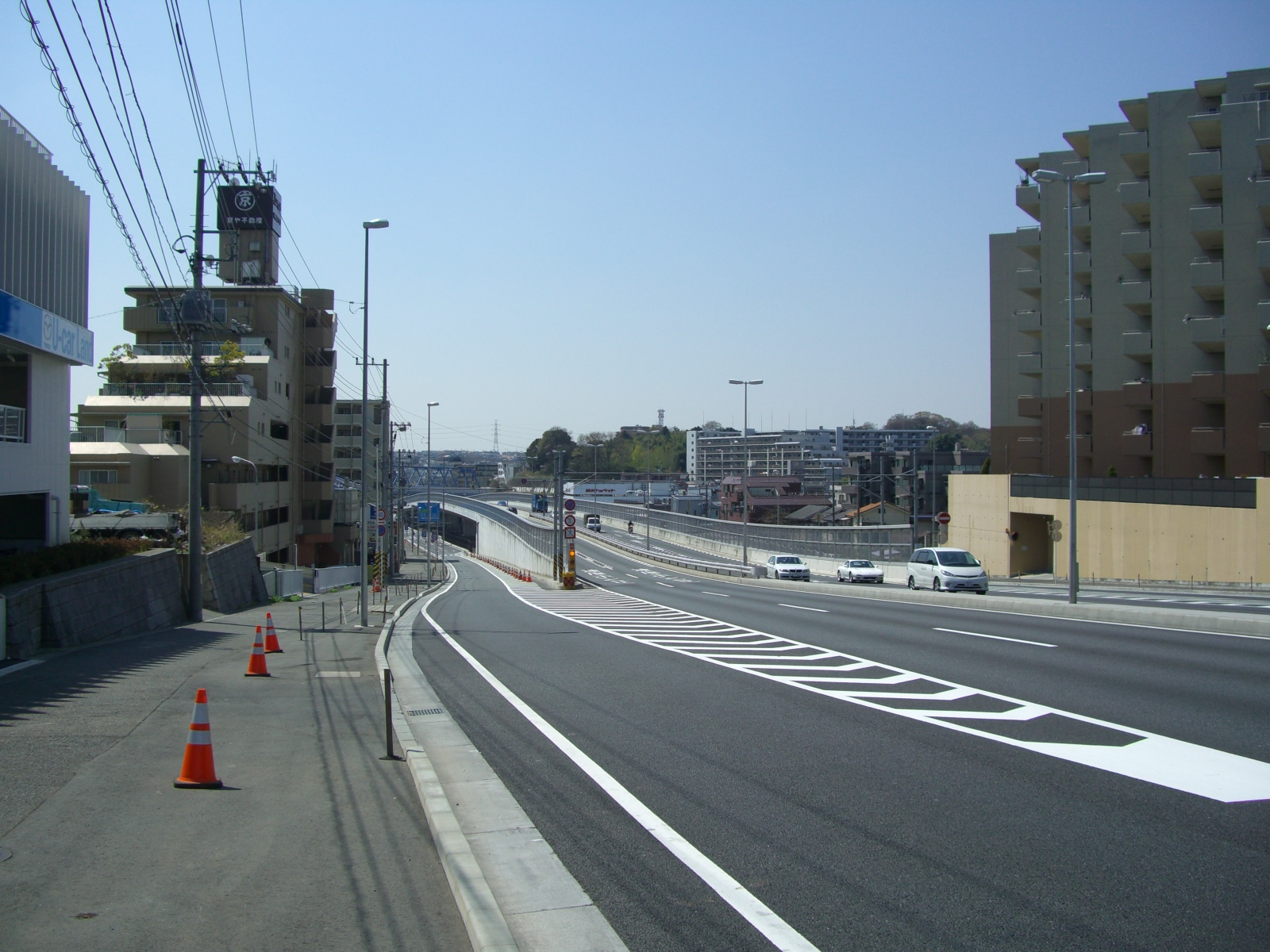 国道246 新石川立体交差